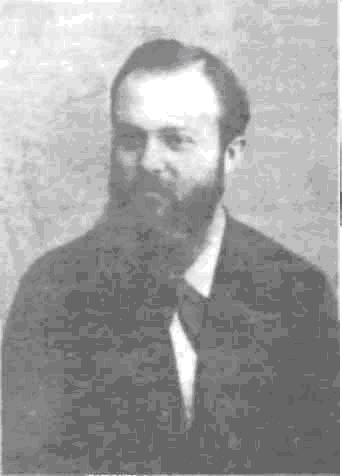 Пантелей Урумов (? - 1909).